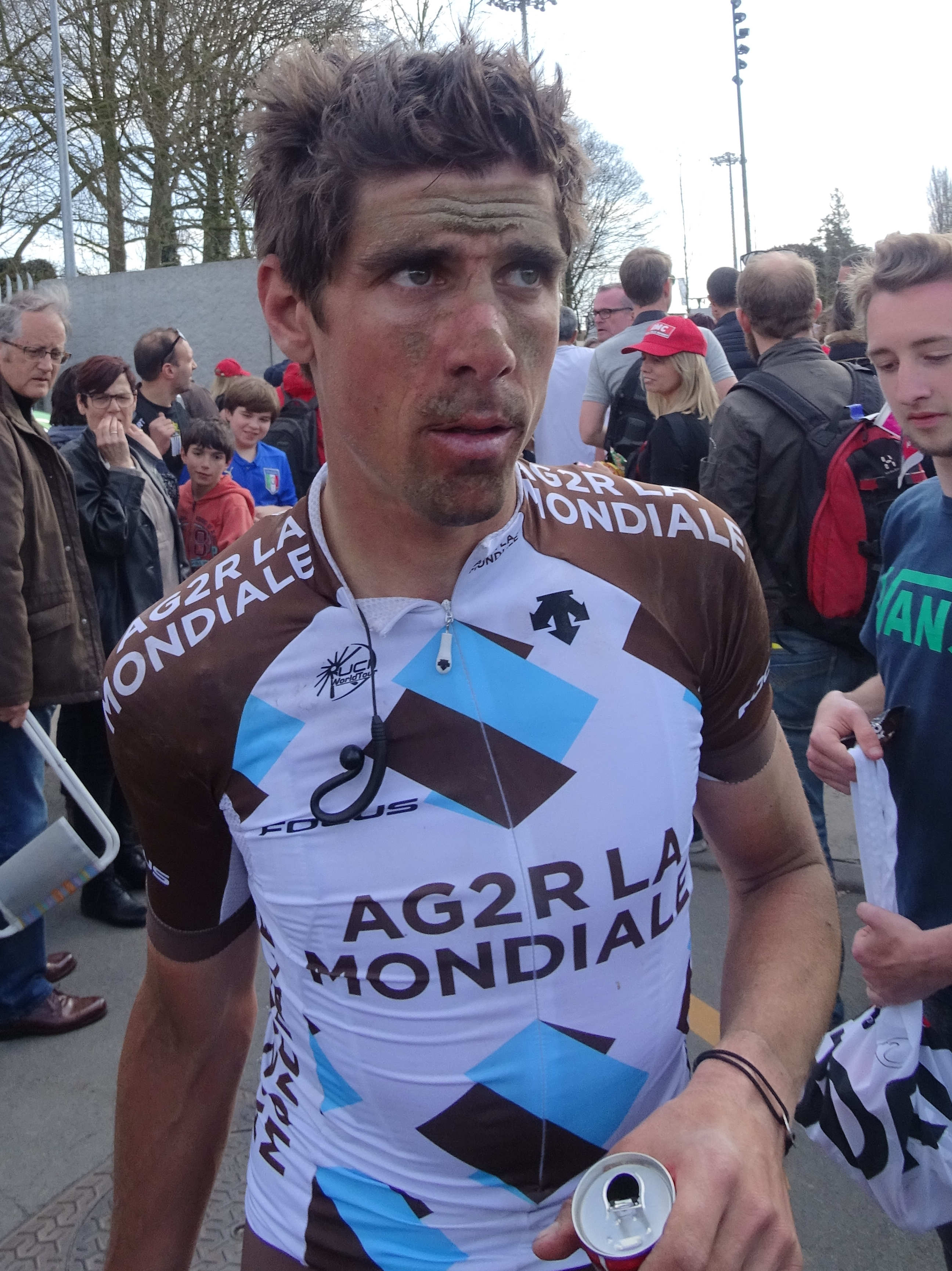 Reportage réalisé le dimanche 12 avril à l'occasion de l'arrivée du Paris-Roubaix 2015 à Roubaix, France.